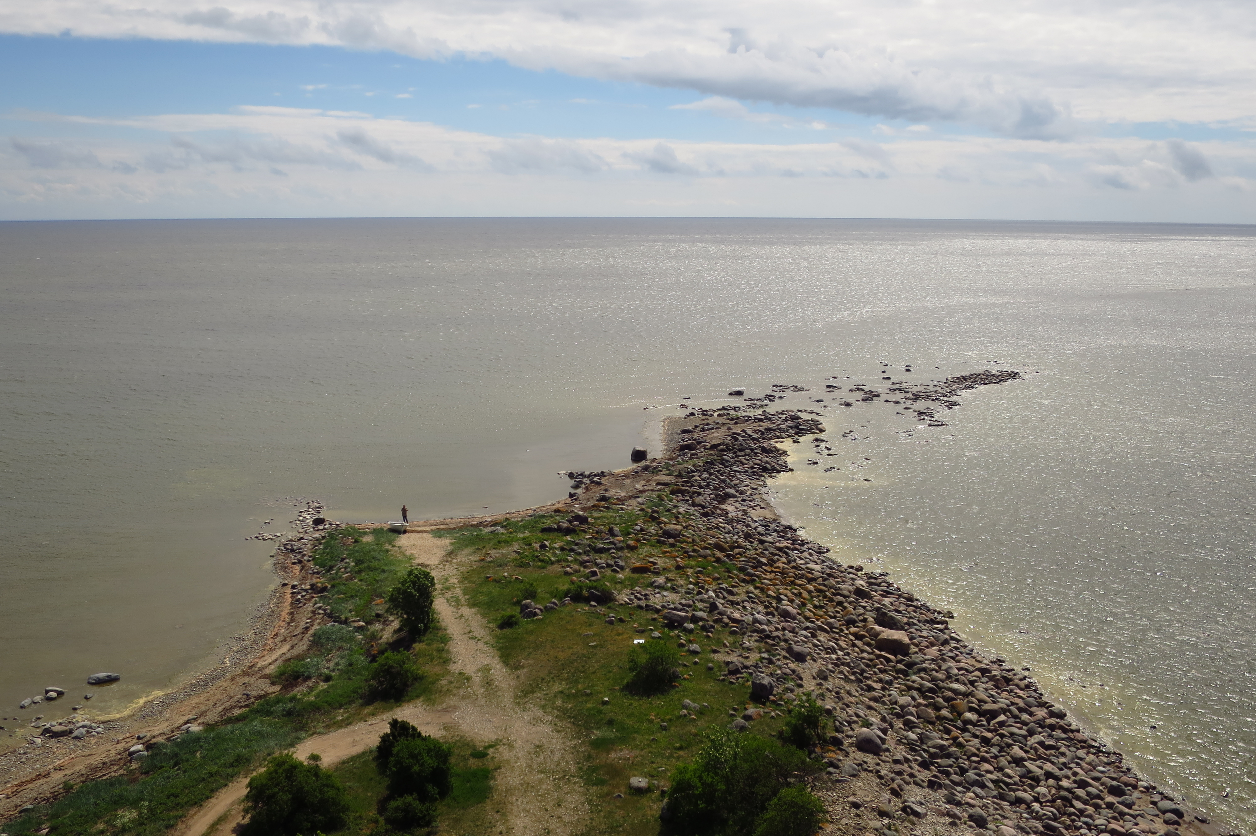 Pitkana ots Kinhus